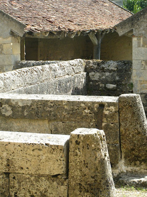 L'abreuvoir et le lavoir d'Asnan